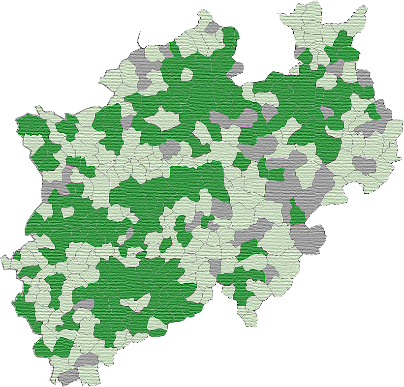 NRW-Karte mit grüner Markierung für alle Grünen Städte und Gemeinden